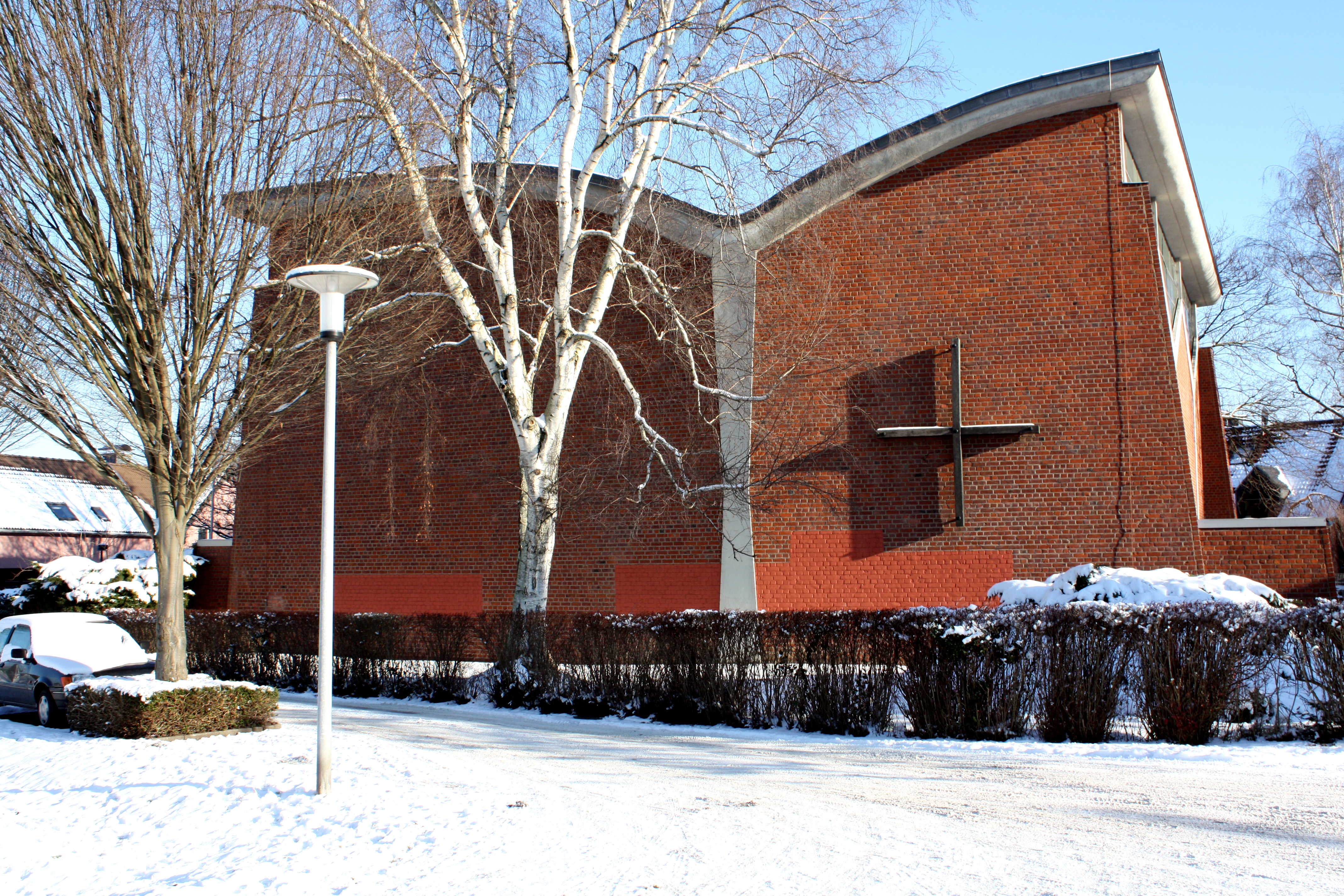 Hürth-Gleuel, profanierte Kirche St. Barbara